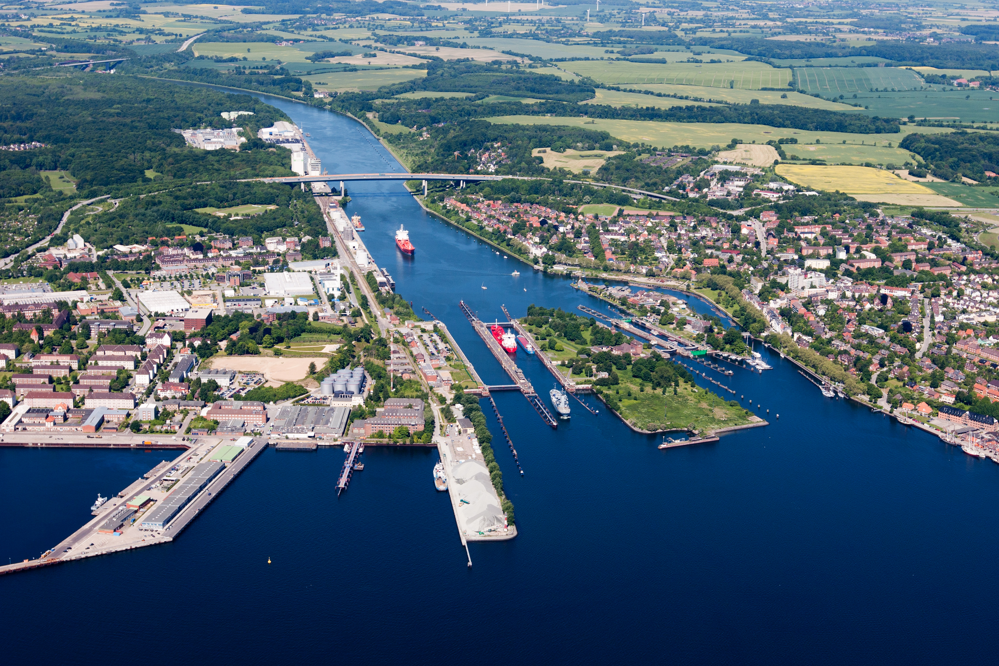 Luftaufnahme der Schleusen in Kiel-Holtenau des Nord-Ostsee-Kanals